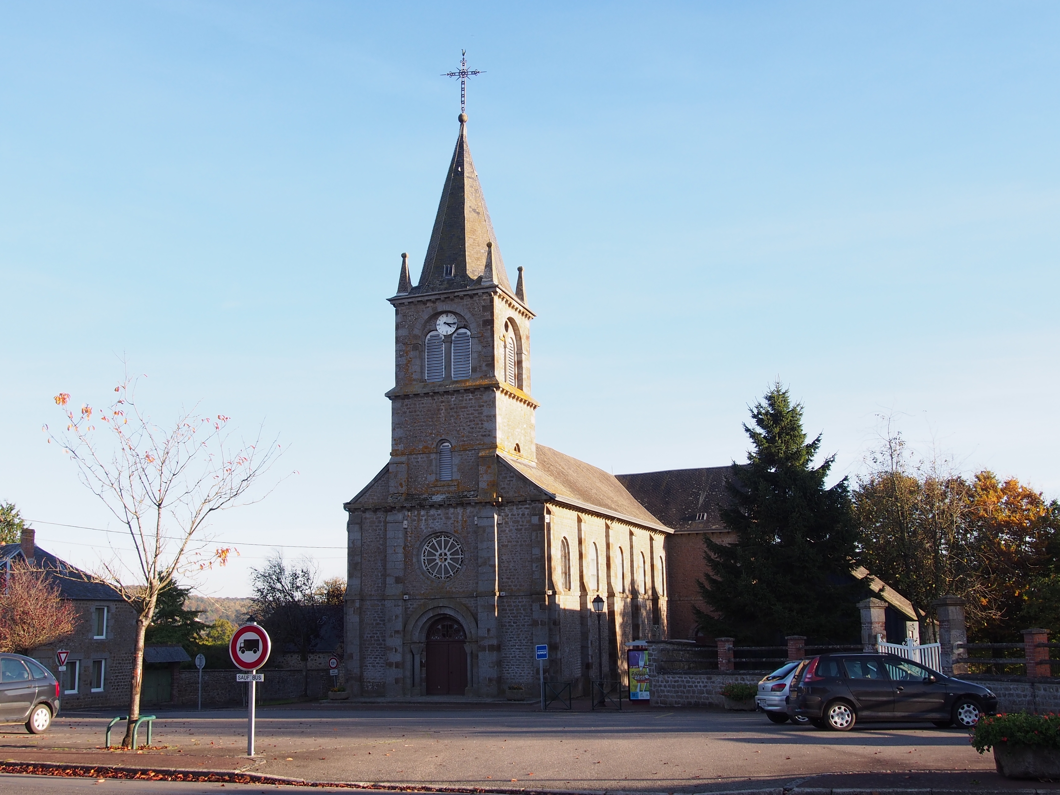 Banvou (Normandie, France). L'église Saint-Ernier.